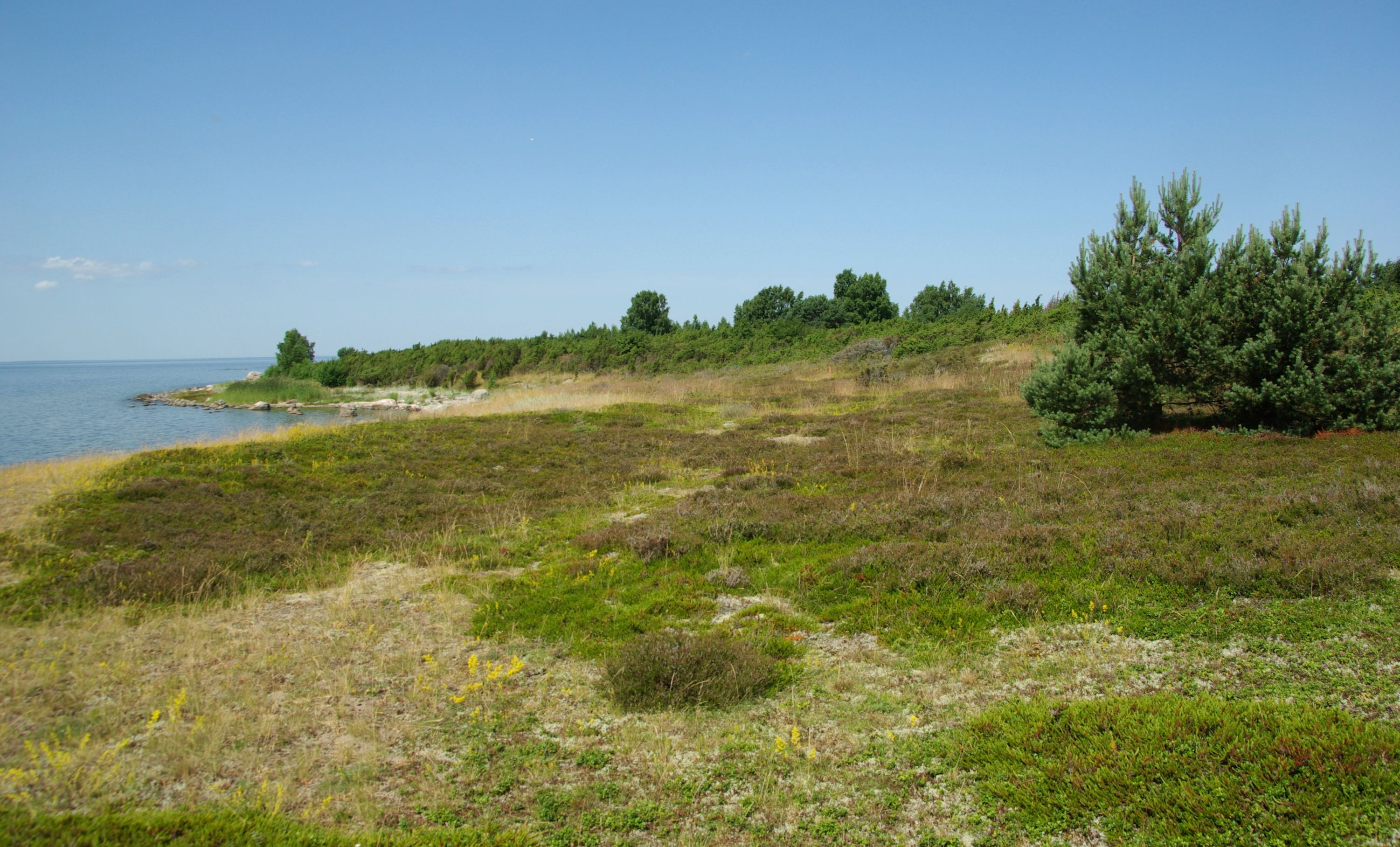 Koipsi(ka Koipse) saar asub Harju maakonnas Jõelähtme vallas Kaberneeme poolsaare otsast 1km põhja pool